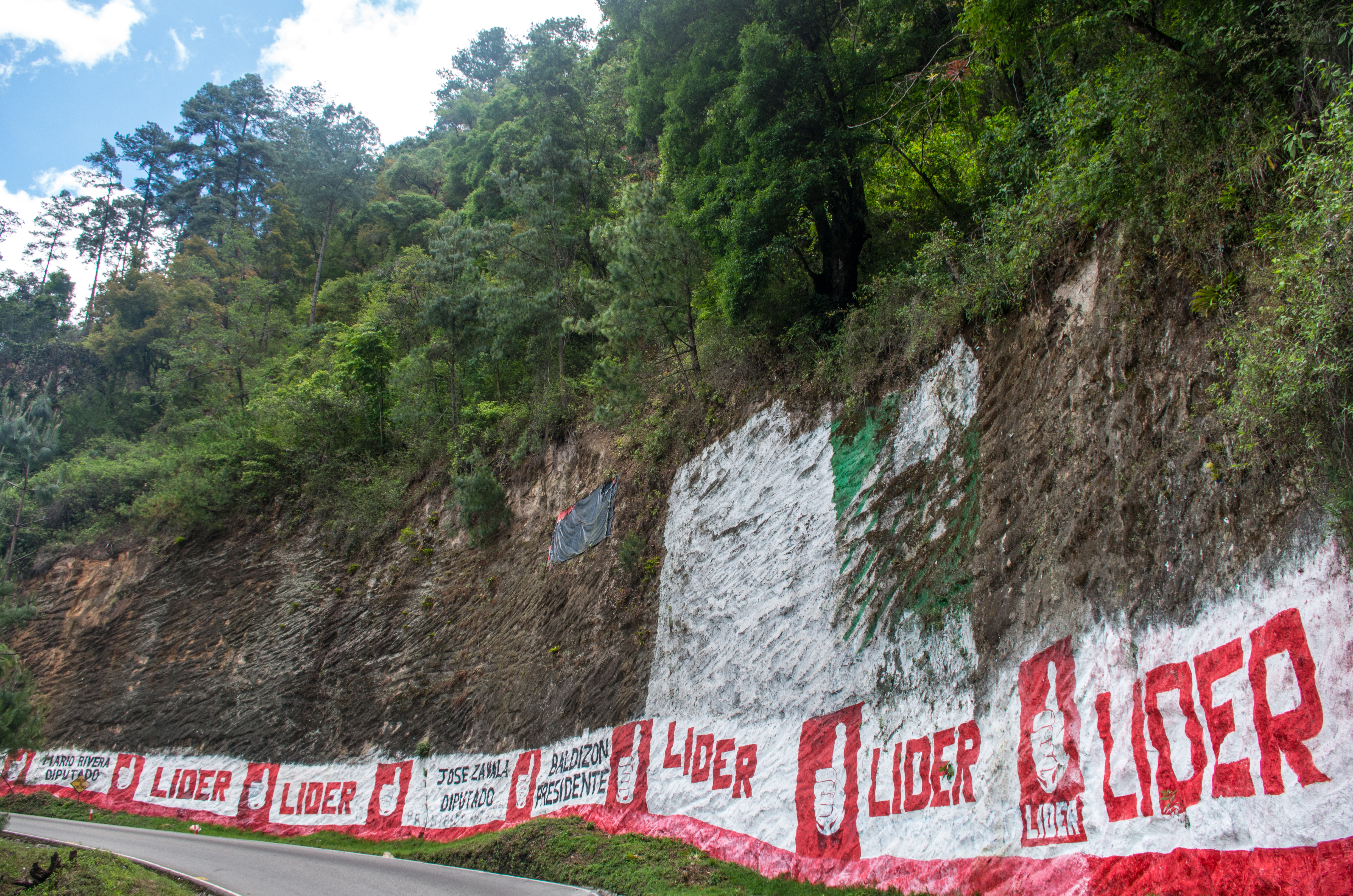 Publicité politique du parti Lider (campagne 2015 des élections présidentielles du Guatemala).